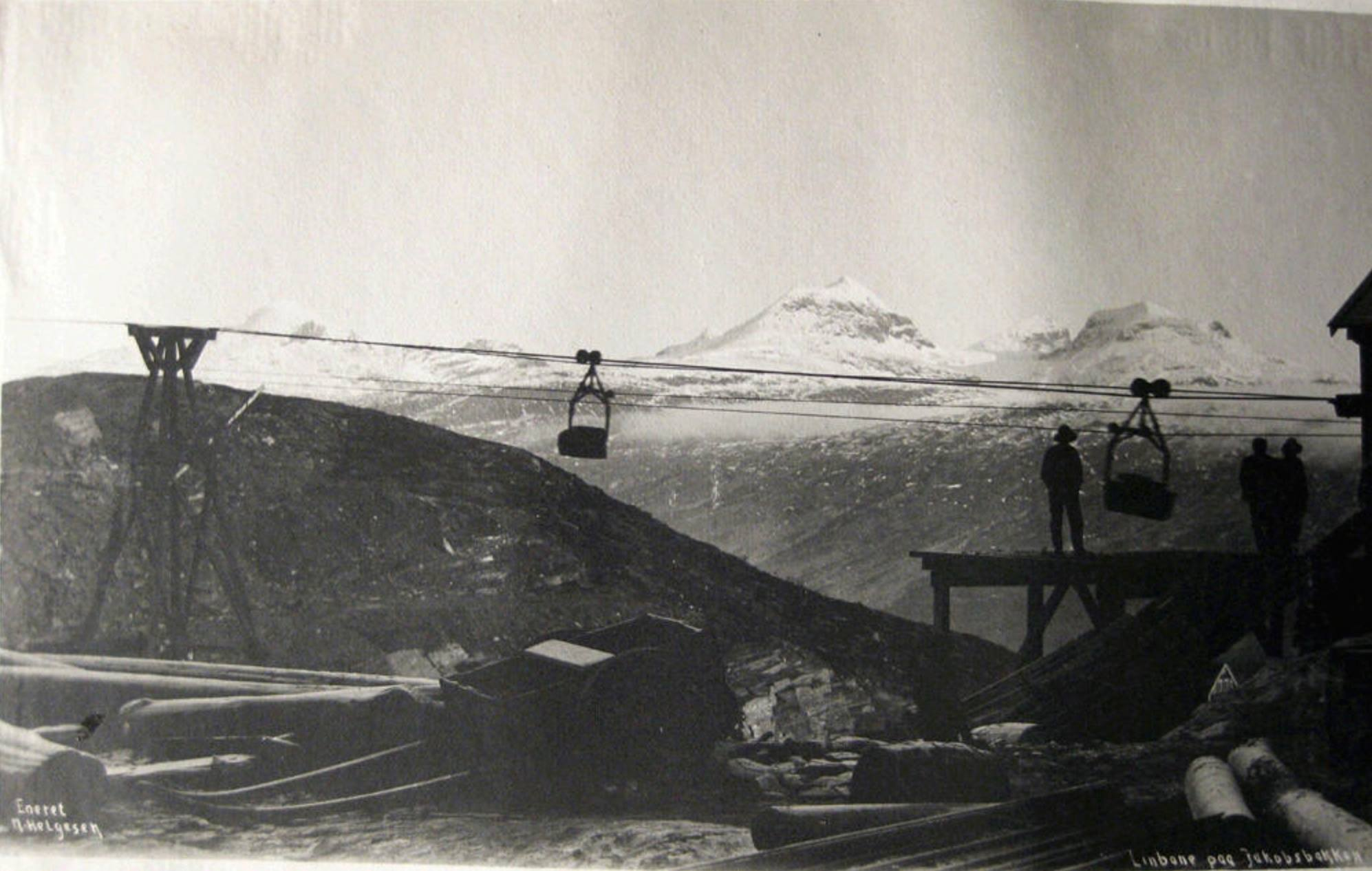 Linbanen på Jakobsbakken